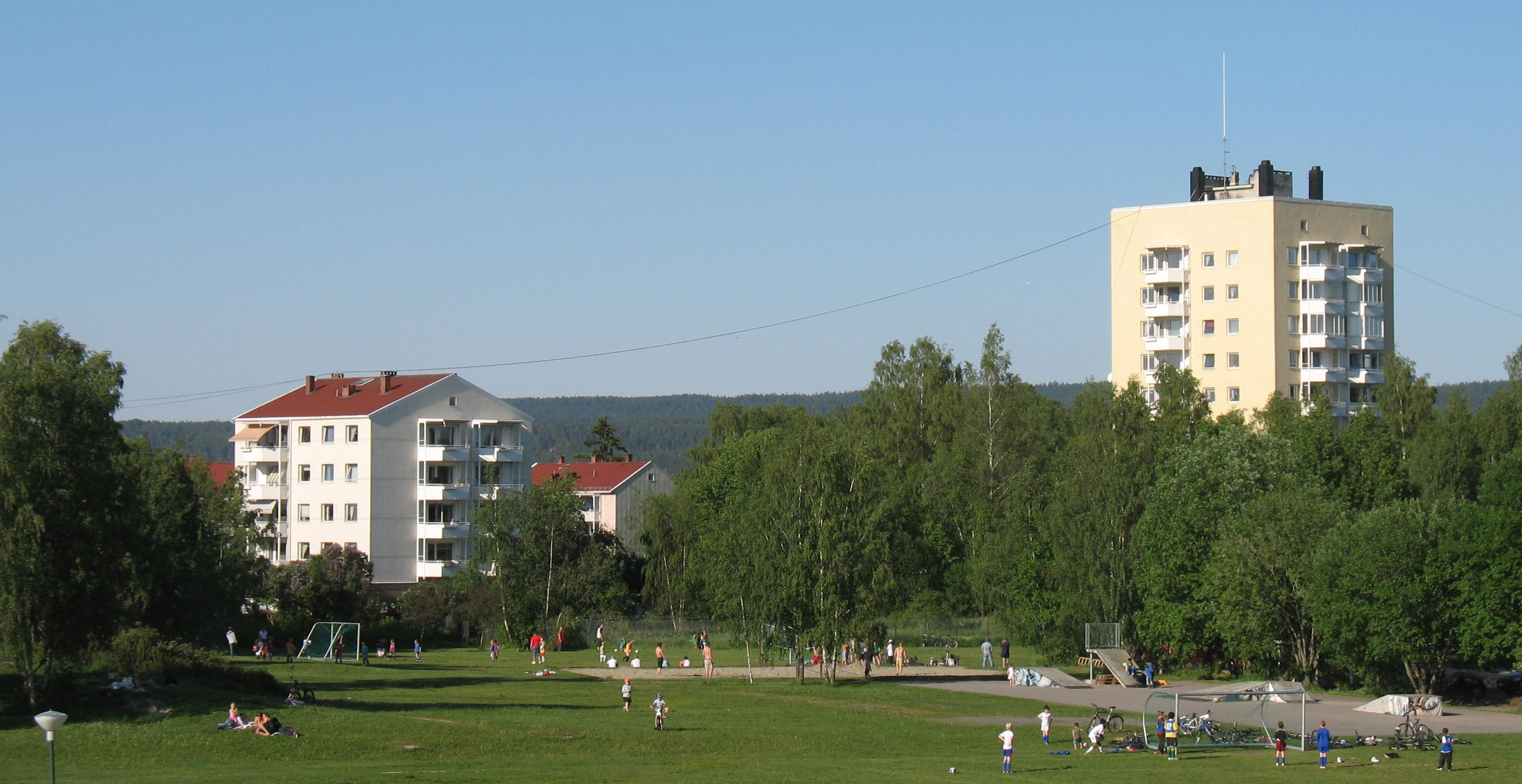 Fotballbanen på Lambertseter i Oslo